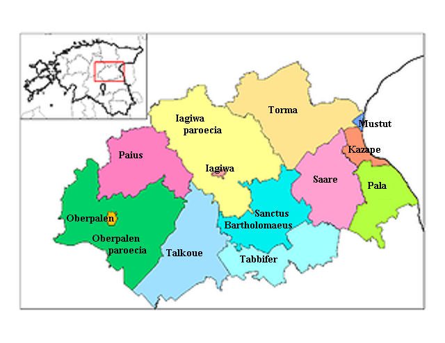 Iagiwae municipia Latine